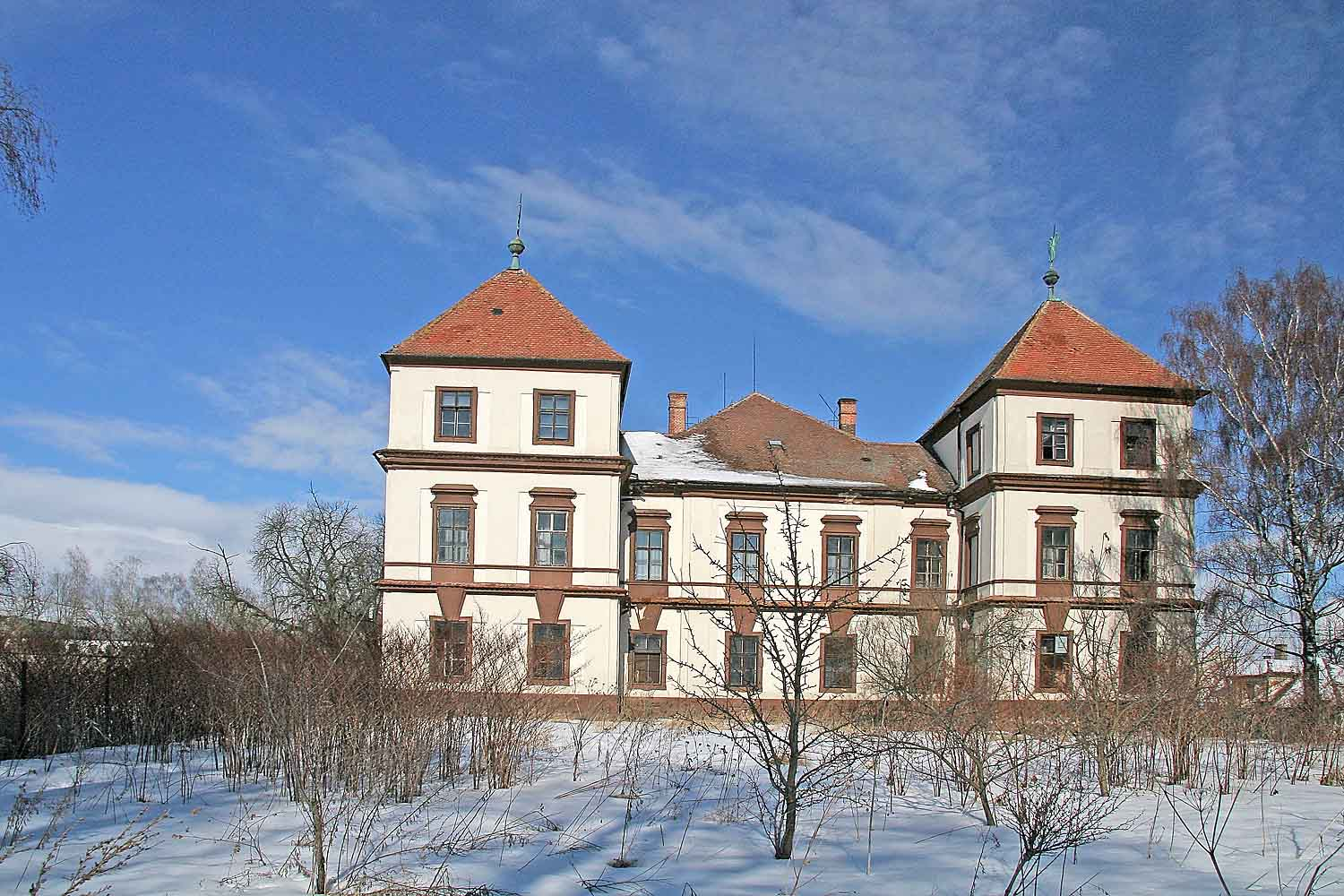 Castle in village Hořiněves, district Hradec Králové, Czech republic Autor: Prazak Date: 20. 2. 2006